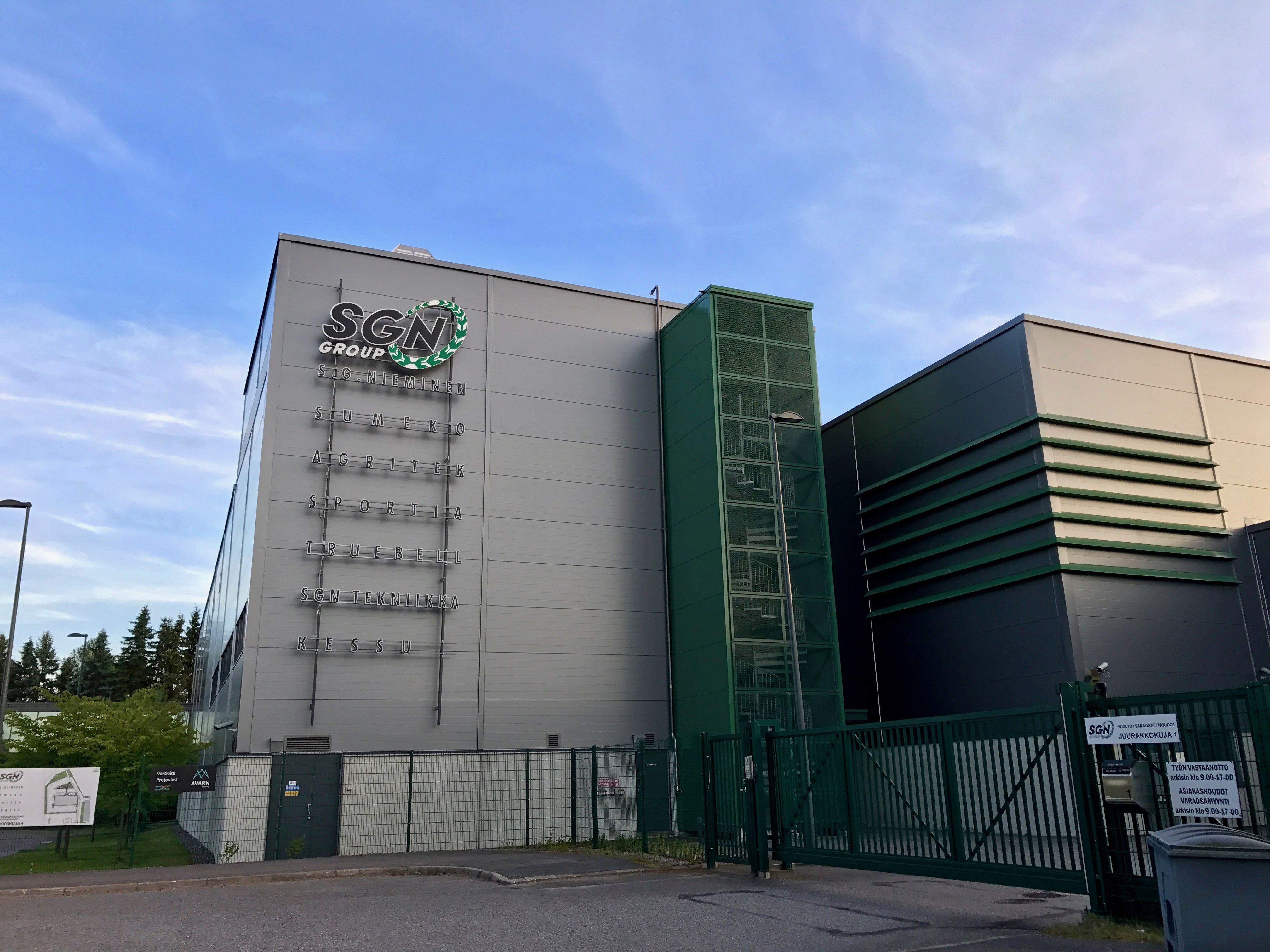 SGN Groupin päätoimipiste Vantaan Koivuhaassa.